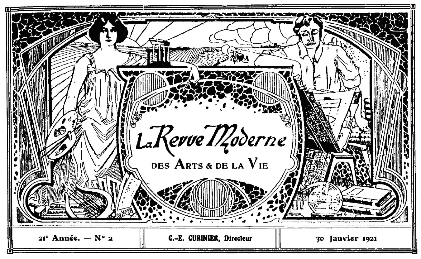 Revue moderne des arts et de la vie, janvier 1921. Directeur : Charles-Emmanuel Curinier.